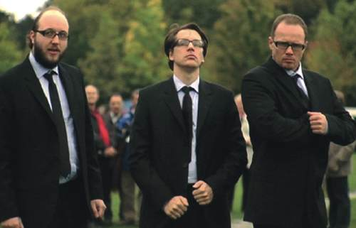 Die Schauspieler Stefan Lampadius, Steffen Jürgens und Sven Daum in dem Film Sonne Über Deutschland von Ronald Krapp